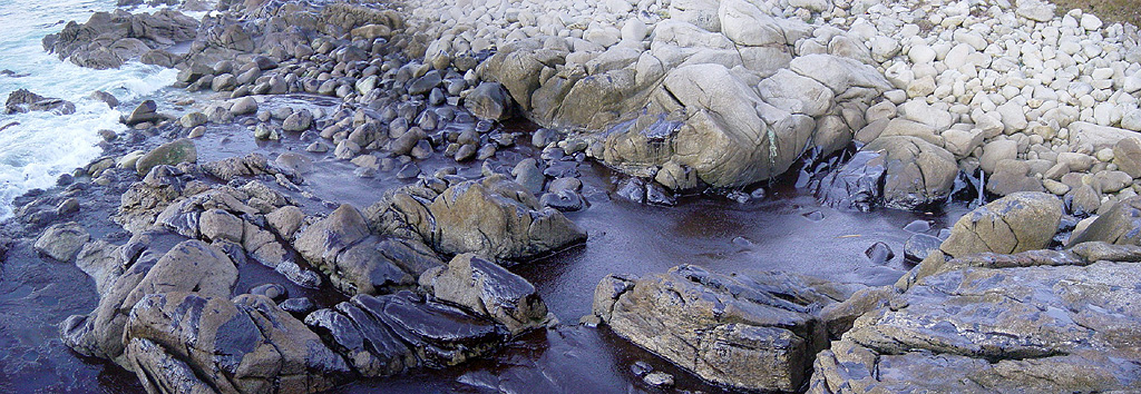 2002 Oia vertido Prestige